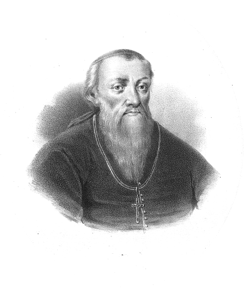 Jakub Uchański primate of Poland